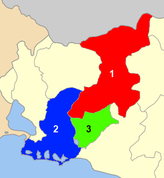 Χάρτης ενοτήτων του Δήμου Κομοτηνής